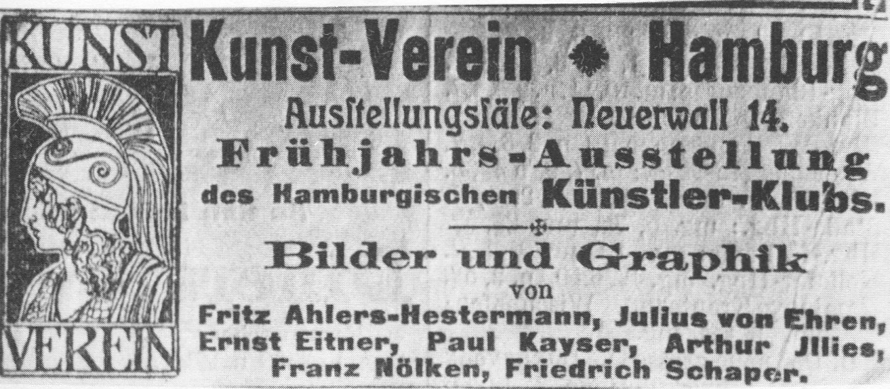 Zeitungsanzeige Ausstellungsplakat des Kunstvereins Hamburg